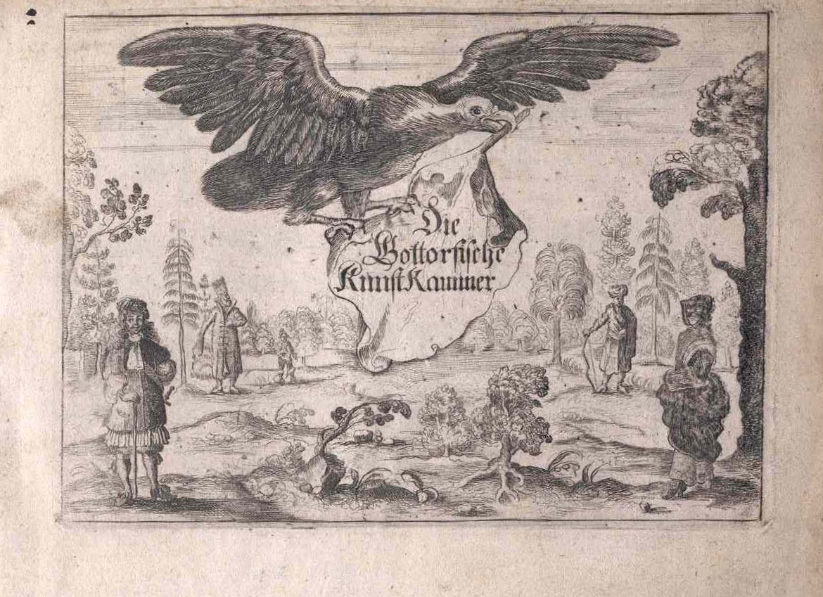 Gottorffische Kunst-Cammer / Worinnen Allerhand ungemeine Sachen /[...] Holwein, Schleßwig 1666 Titelkupfer